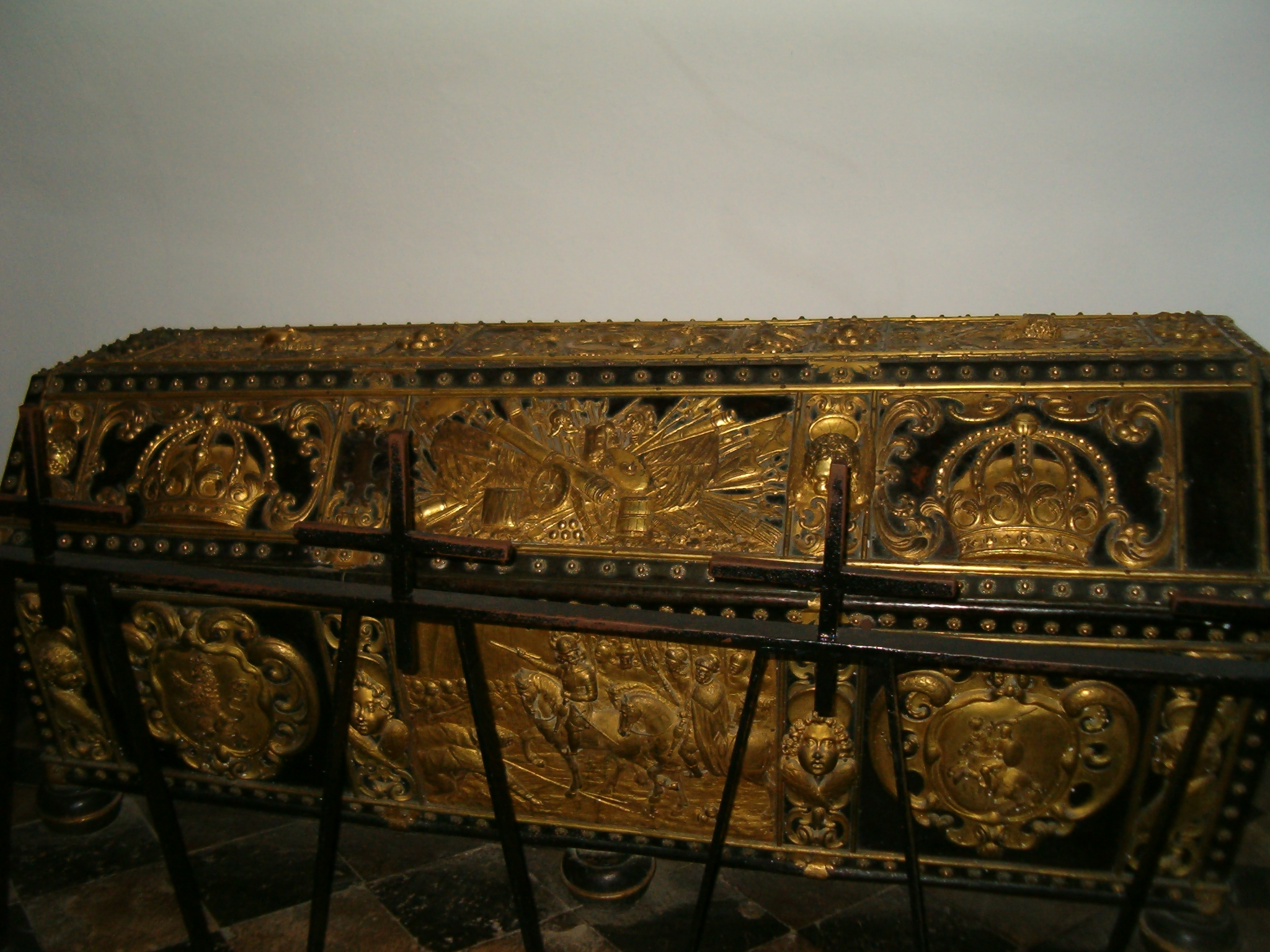 Sarkofag Władysława IV Wazy w Królewskiej Katedrze na Wawelu